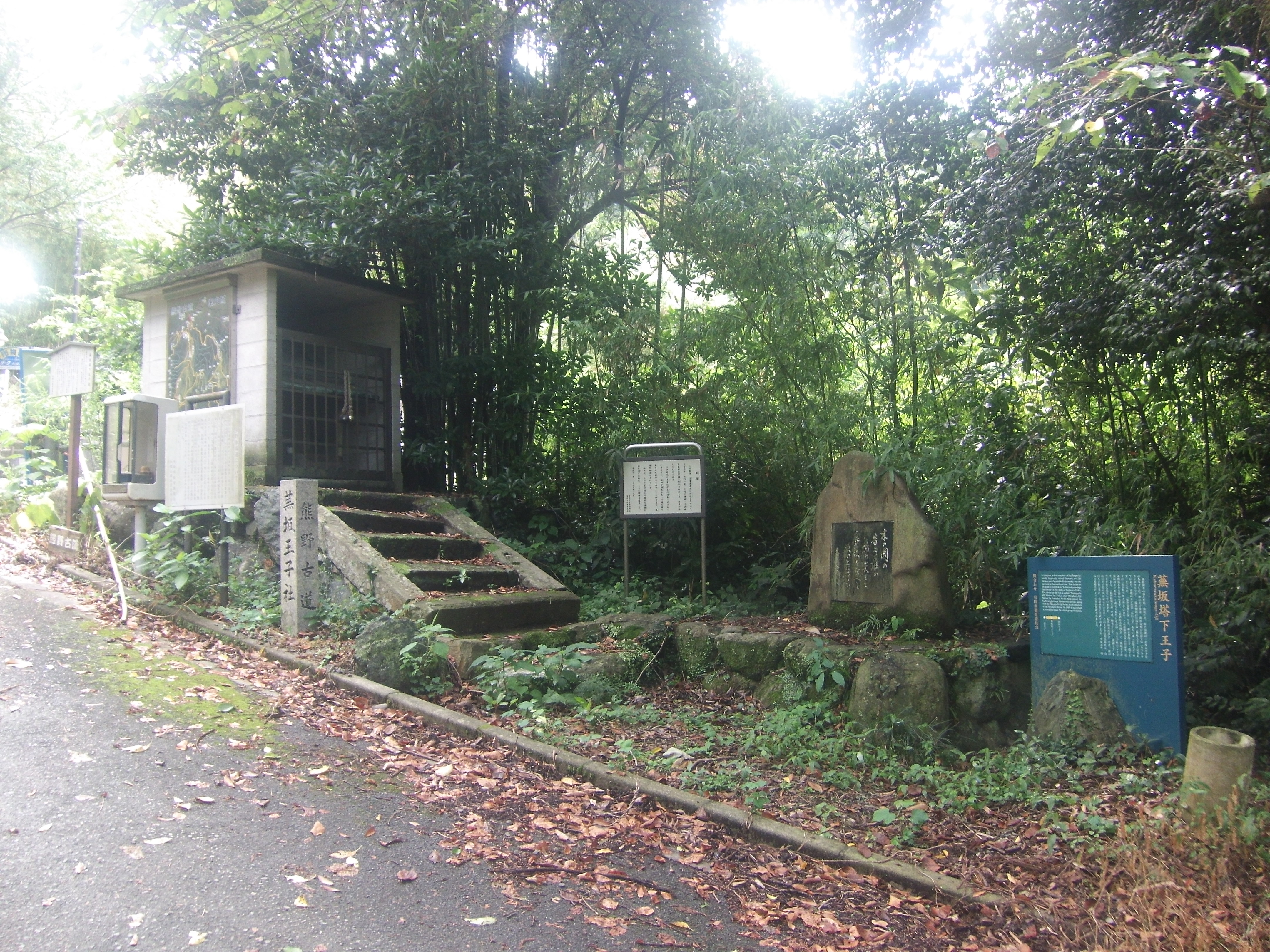 熊野古道・紀伊路の九十九王子の一つ蕪坂塔下王子（和歌山県有田市）